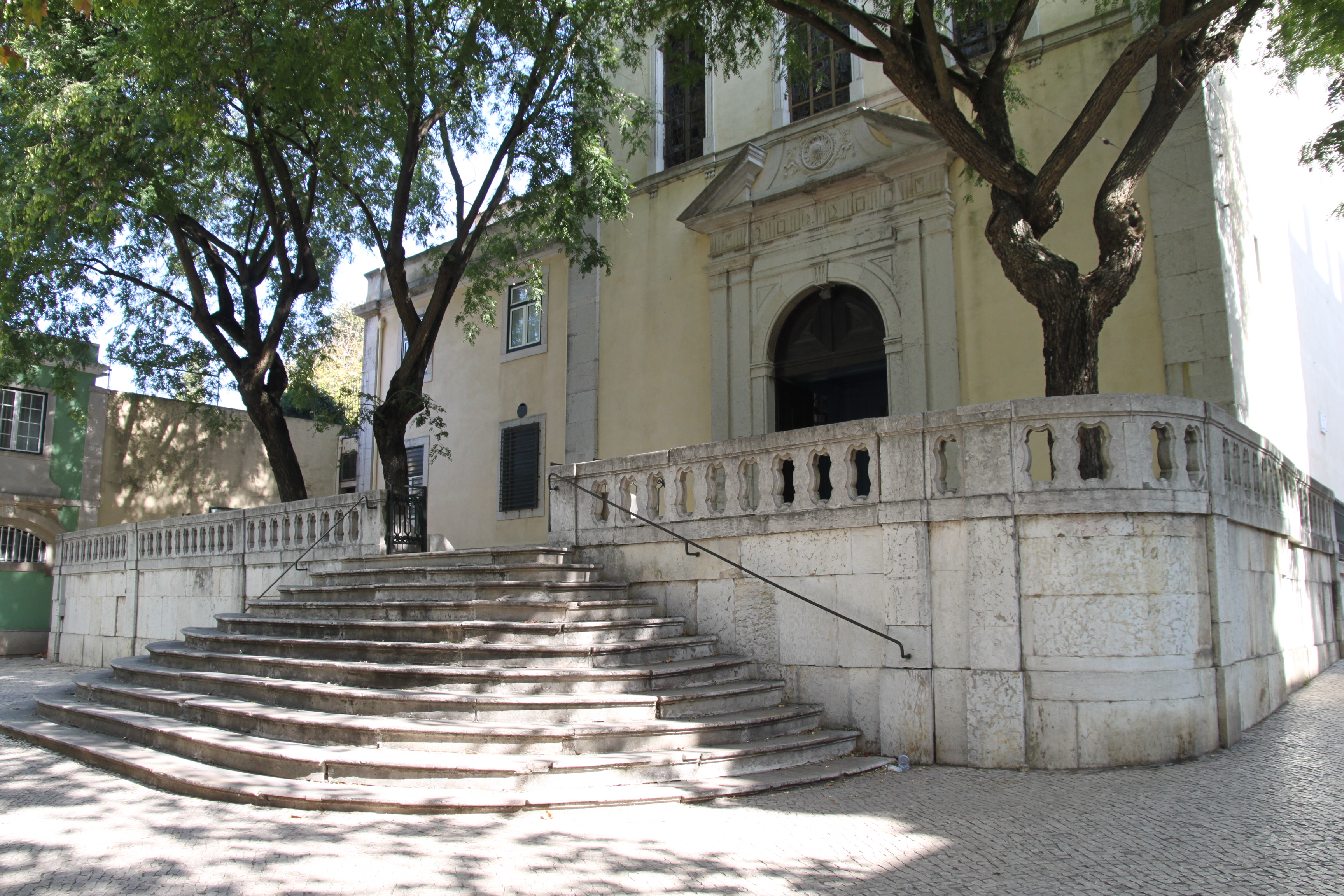 Igreja de São Mamede This file was uploaded for Wiki Loves Monuments in Portugal with the unique identifier 97015432.